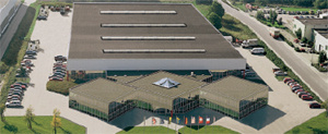 Foto Niederlassung Nord (Hauptsitz) Goslar, Deutschland